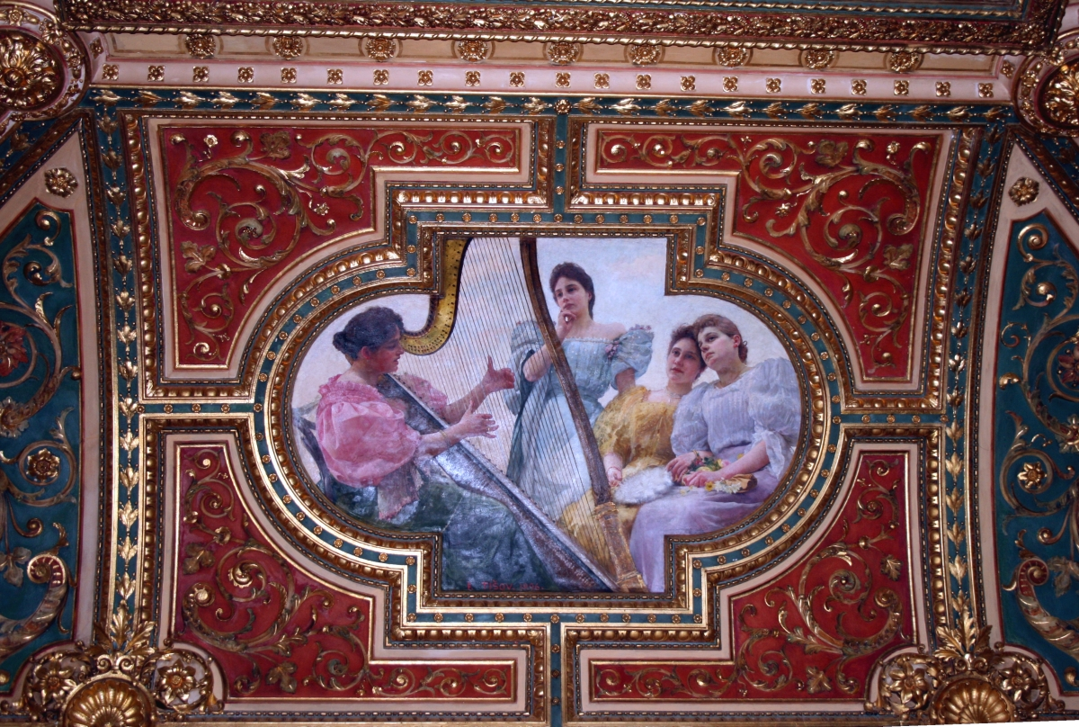 Umjetnost, rad Ivan Tišov u Hrvatskom institutu za povijest u Zagrebu